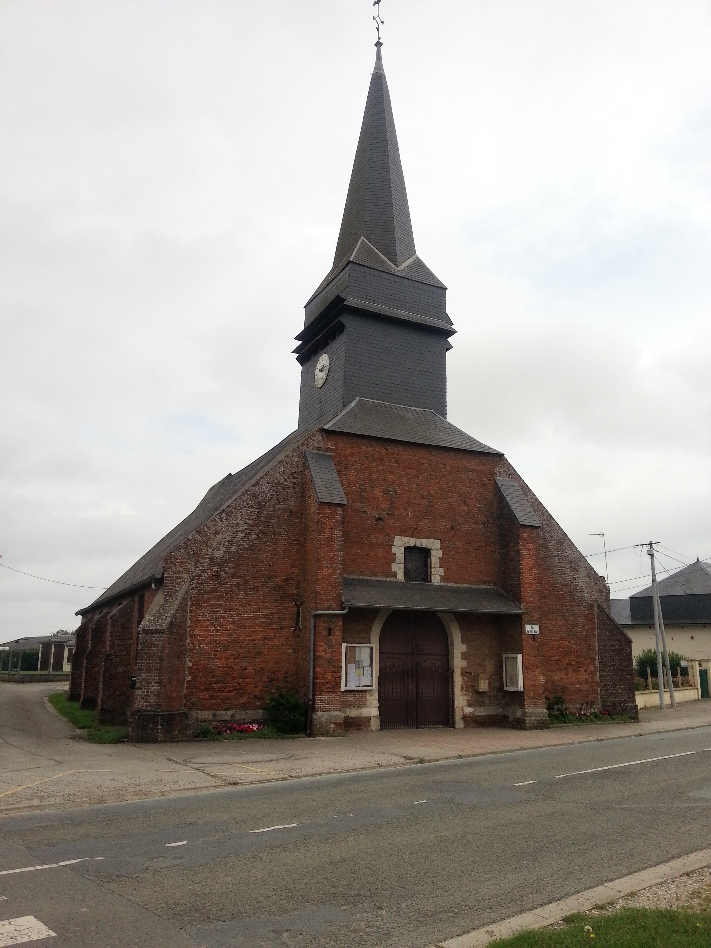 Eglise de Fouilloy